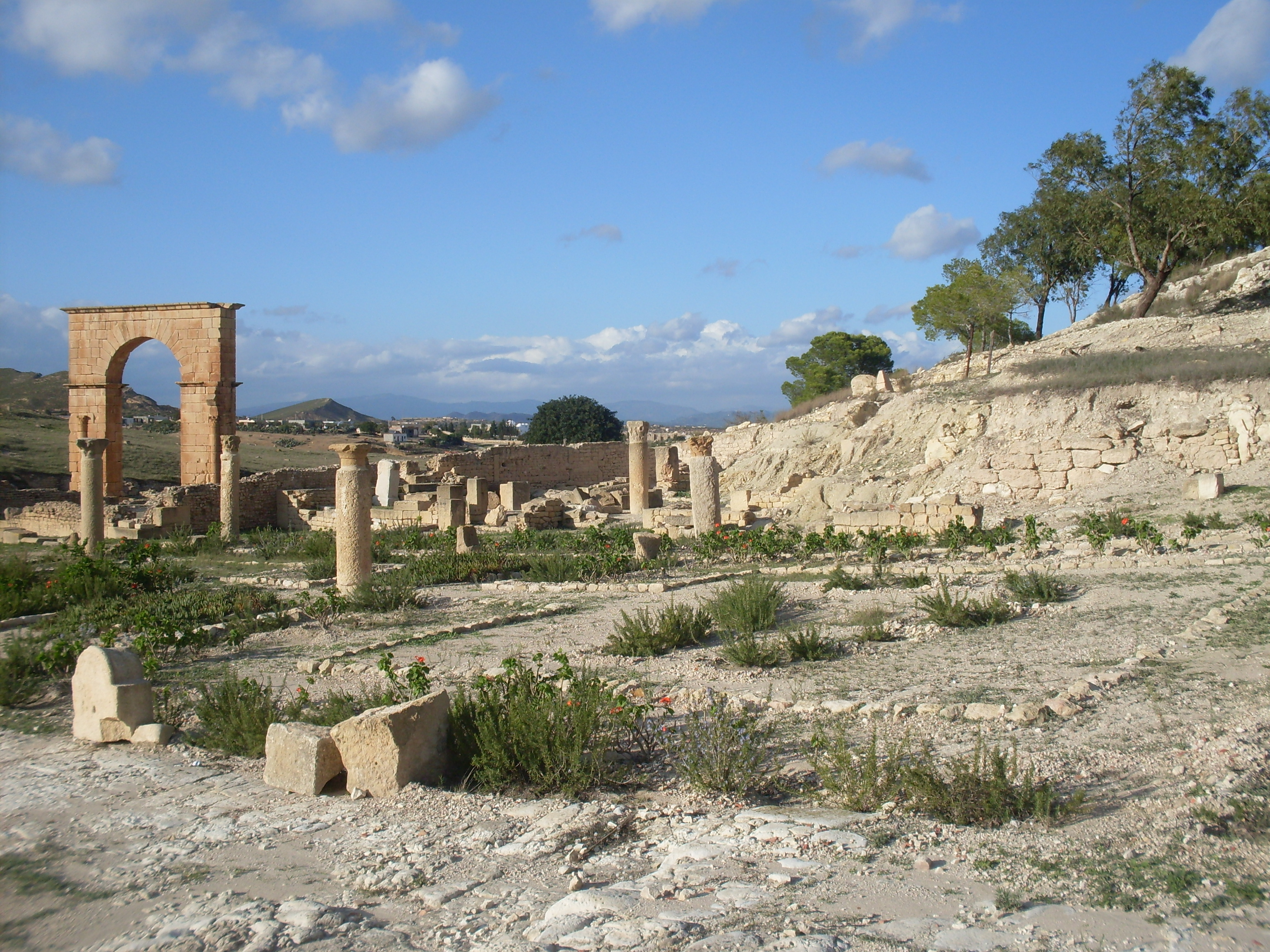 Tunisie, Pheradi majus, marché